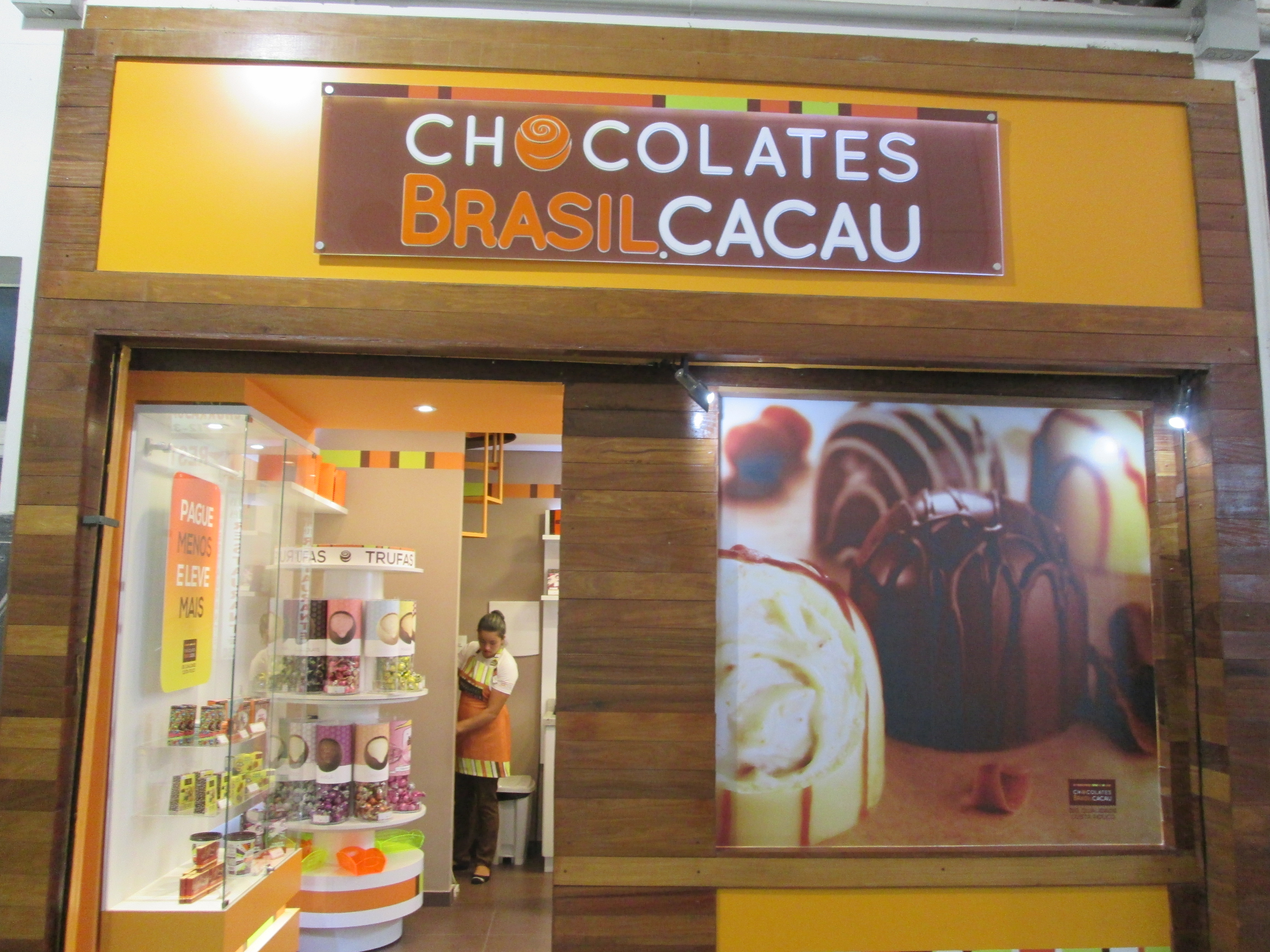 Chocolates Brasil Cacau, na Galeria Tenente Belfort Arantes, Juiz de Fora, Minas Gerais, Brasil.